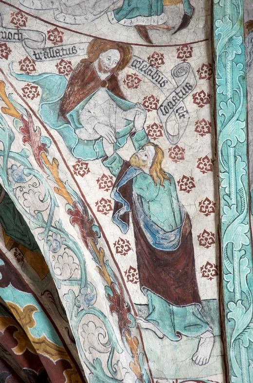 Kalkmålning i travé 2, av Albertus Pictor. Henok upptages till himlen. Motiv: Härkeberga kyrka Kategori: (03) KalkmålningarKalkmålning i travé 2, av Albertus Pictor. Henok upptages till himlen.